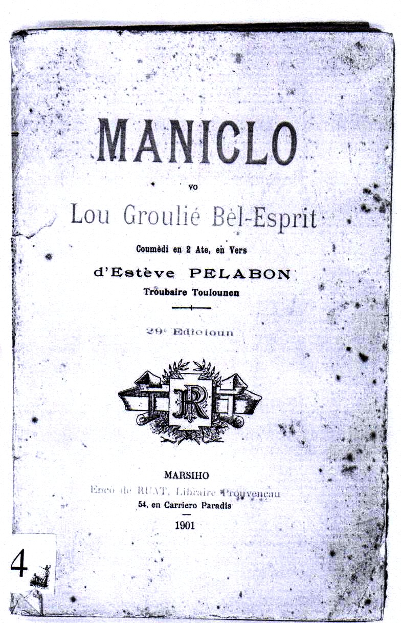 edition de maniclo du Felibrige, 1901, texte d'Etienne Pelabon, 1790